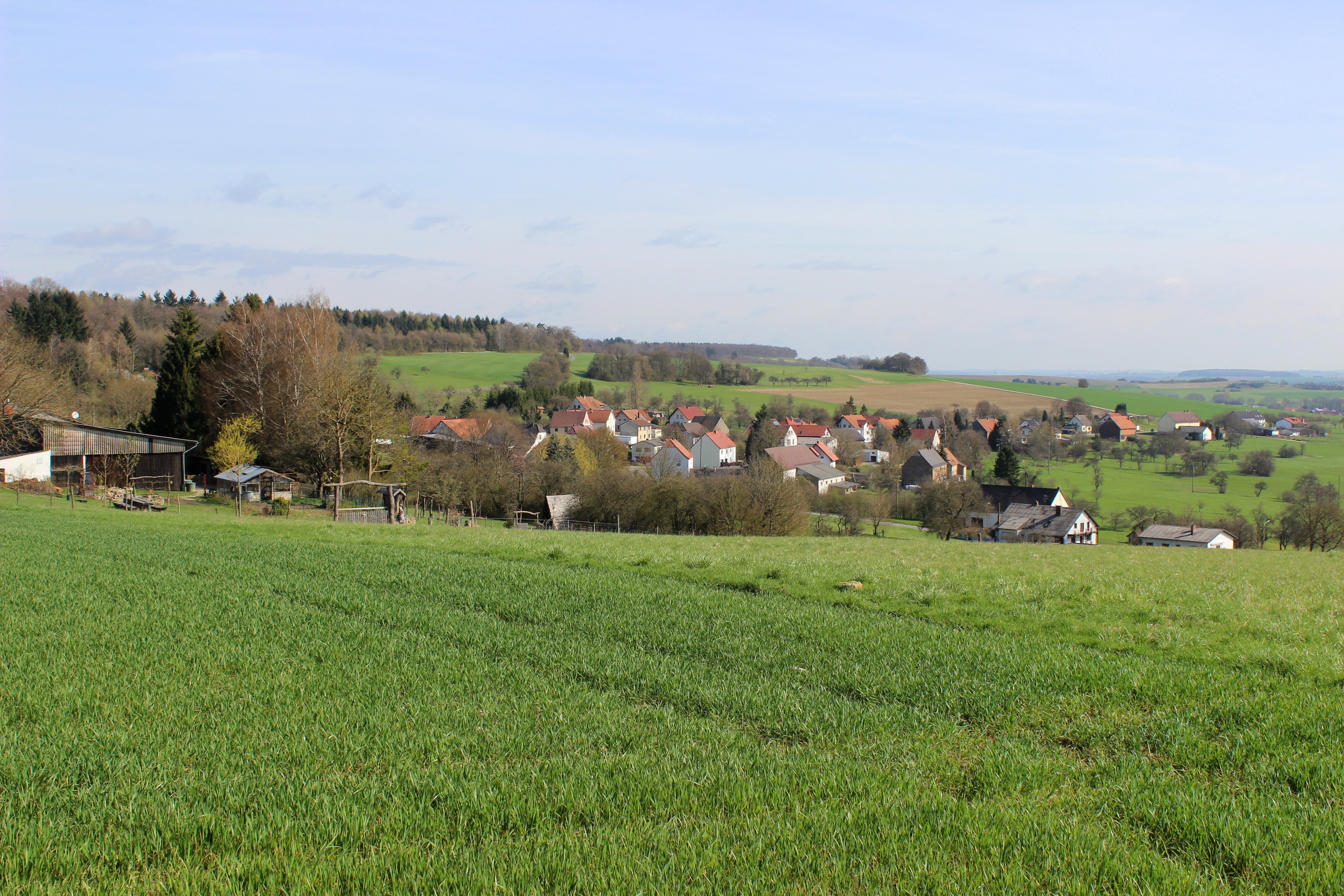 Seyweiler, Gemeinde Gersheim, Saarpfalz-Kreis, Saarland